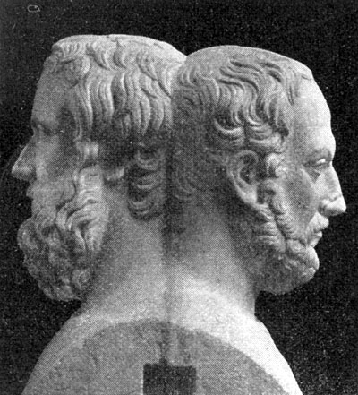 Erma a Doppio ritratto di Erodoto e Tucidide, facente parte della Collezione Farnese, oggi esposta nel Museo Archeologico Nazionale di Napoli (inv. 6239). In basso davanti al ritratto vi è incisa l'iscrizione greca dei nomi in caratteri capitali "Erodotos Toukidides".